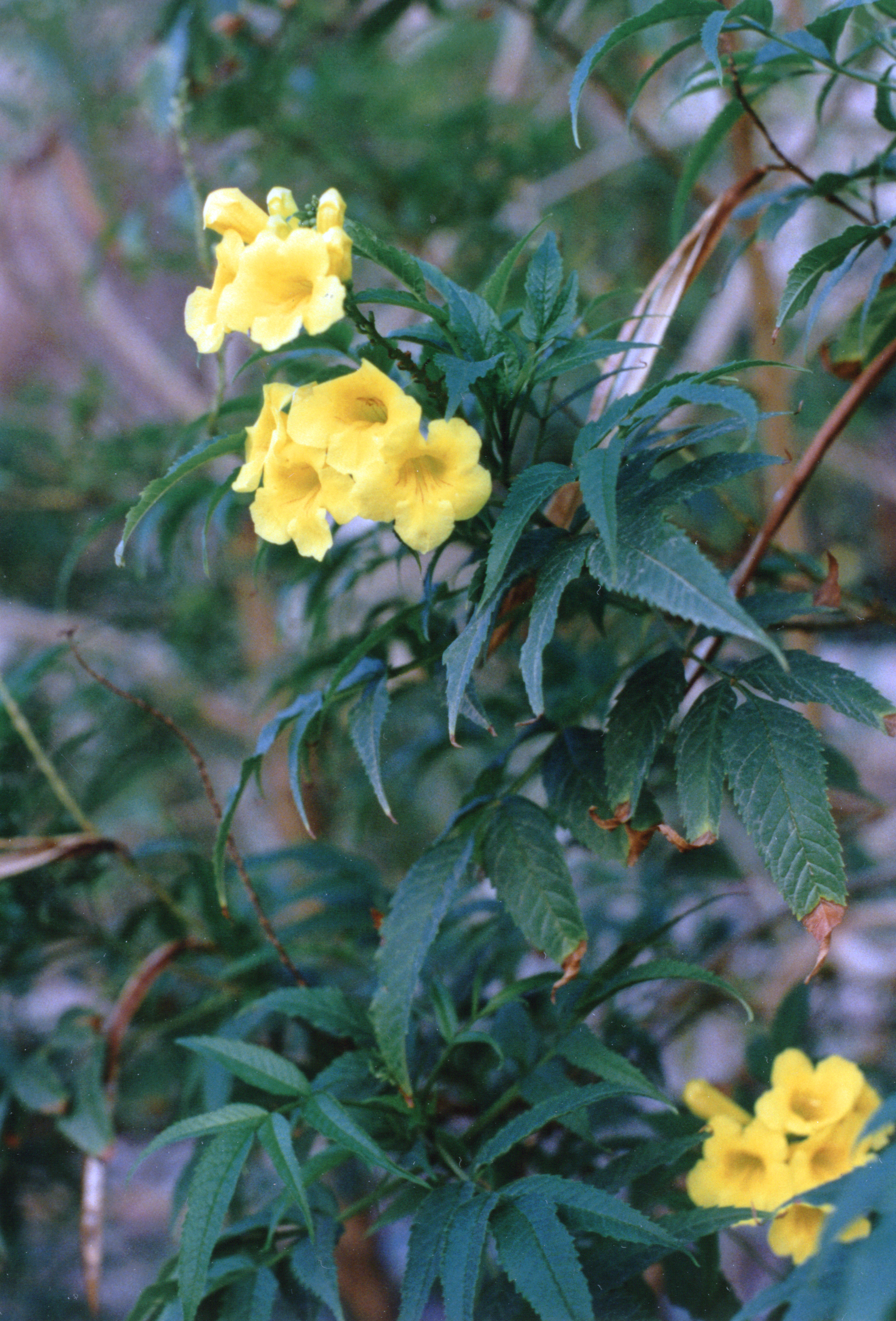 Doxantha unguis-cati, jardines de Mojácar, Almería, España.